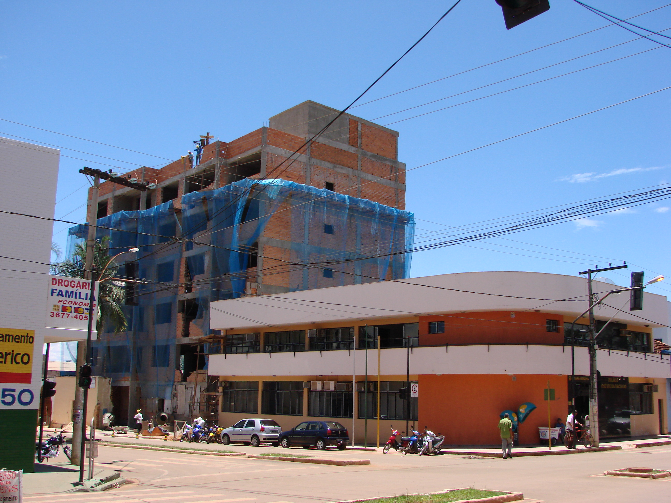 Câmara Municipal de Unaí - Palácio José Vieira Machado